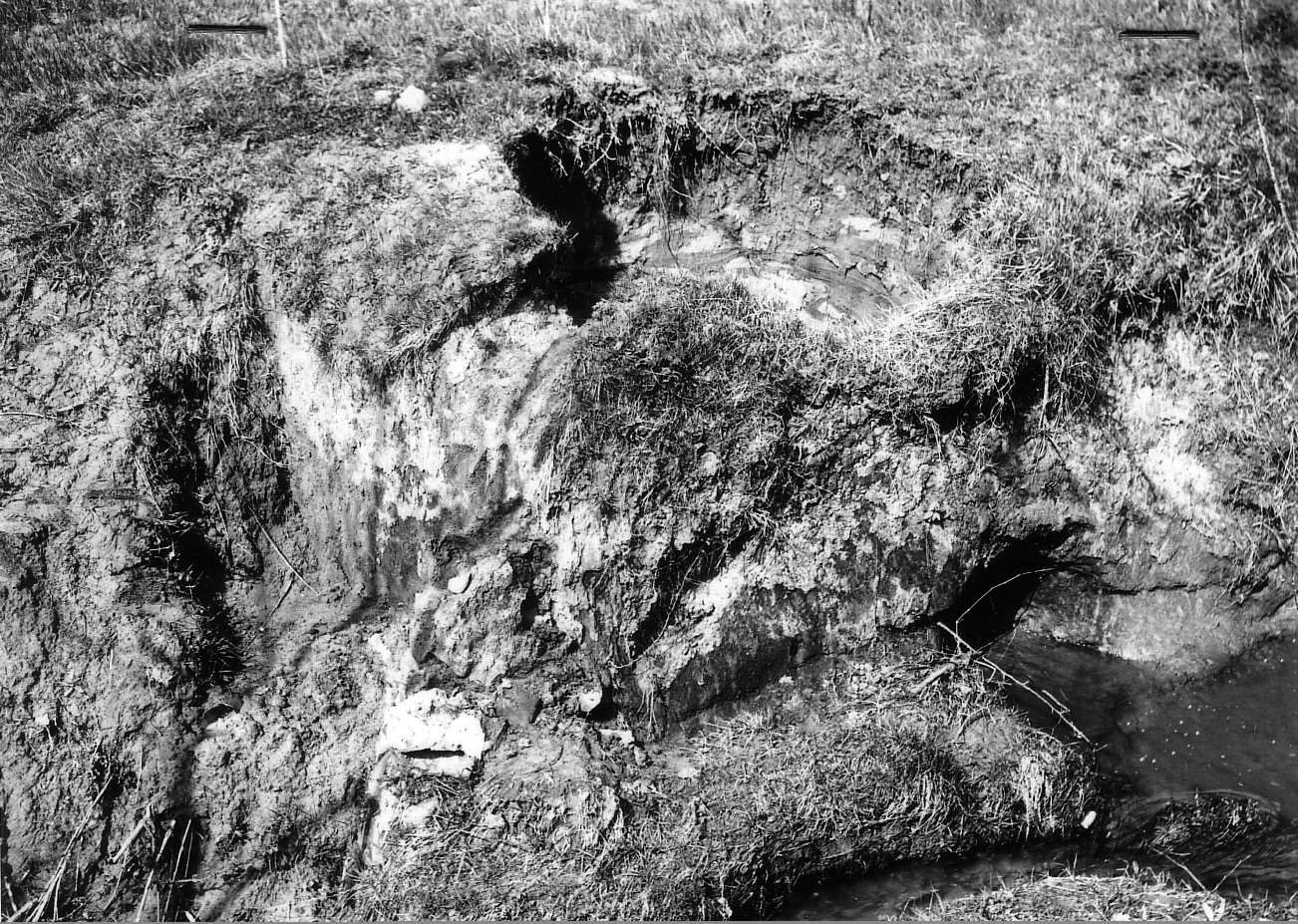 Ustrinum (lat. - forno crematorio) di forma circolare sito nella valle di Sanguineto - Tuoro s/T - fotografato dal Prof. Giancarlo Susini nel 1959 e da lui attribuito come opera eseguita al termine della battaglia del Trasimeno. Il manufatto era ricolmo di ceneri organiche e ricoperto da un tumulo. Sono state ritrovate, frammiste alle ceneri, punte di frecce e la punta di un pilum. Nella valle ne sono stati censiti circa 16 di questo tipo, all'inizio degli anni '60. I due principali (uno in via del Fornello e l'altro presso il Palazzo del Capra - Centro di documentazione della Battaglia del Trasimeno) sono stati consolidati con muratura e sono tuttora visibili. Dimensioni medie del secondo sono 6,18 mt di profondità e 4,32 mt di diametro. Per maggiori informazioni si veda Susini G., Ricerche sulla battaglia del Trasimeno, Accademia Etrusca di Cortona, Annuatio XI, nuova serie Vol. IV, 1960, pagg. 84-89